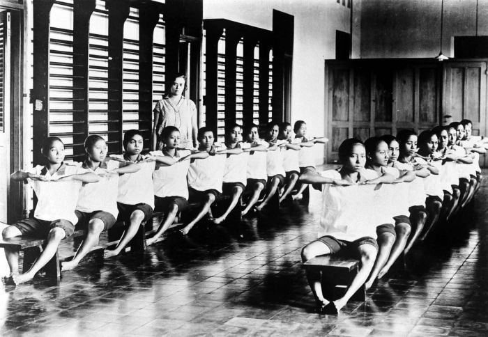 Repronegatief. Gymnastiekonderwijs op de 'Normaalschool tot opleiding van inheemse hulponderwijzeressen' te Yogyakarta, Java